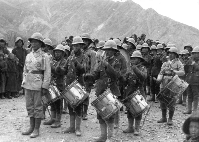 Lhasa, die Neujahrsparade des modernen Militärs vor dem Potala